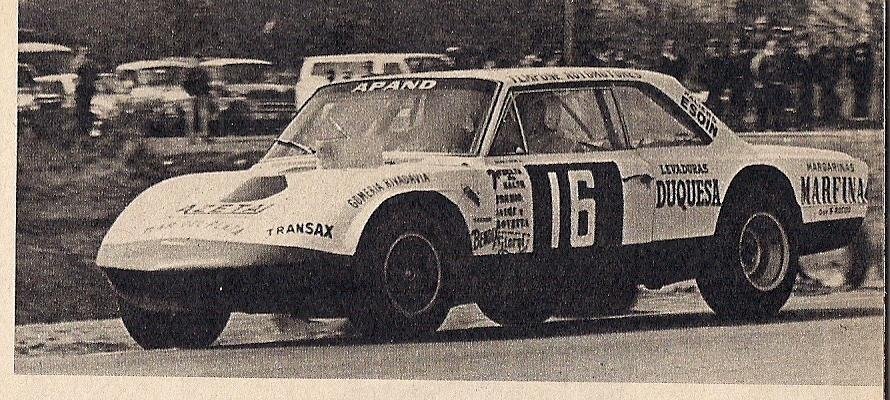 Liebre MK I y 1/2